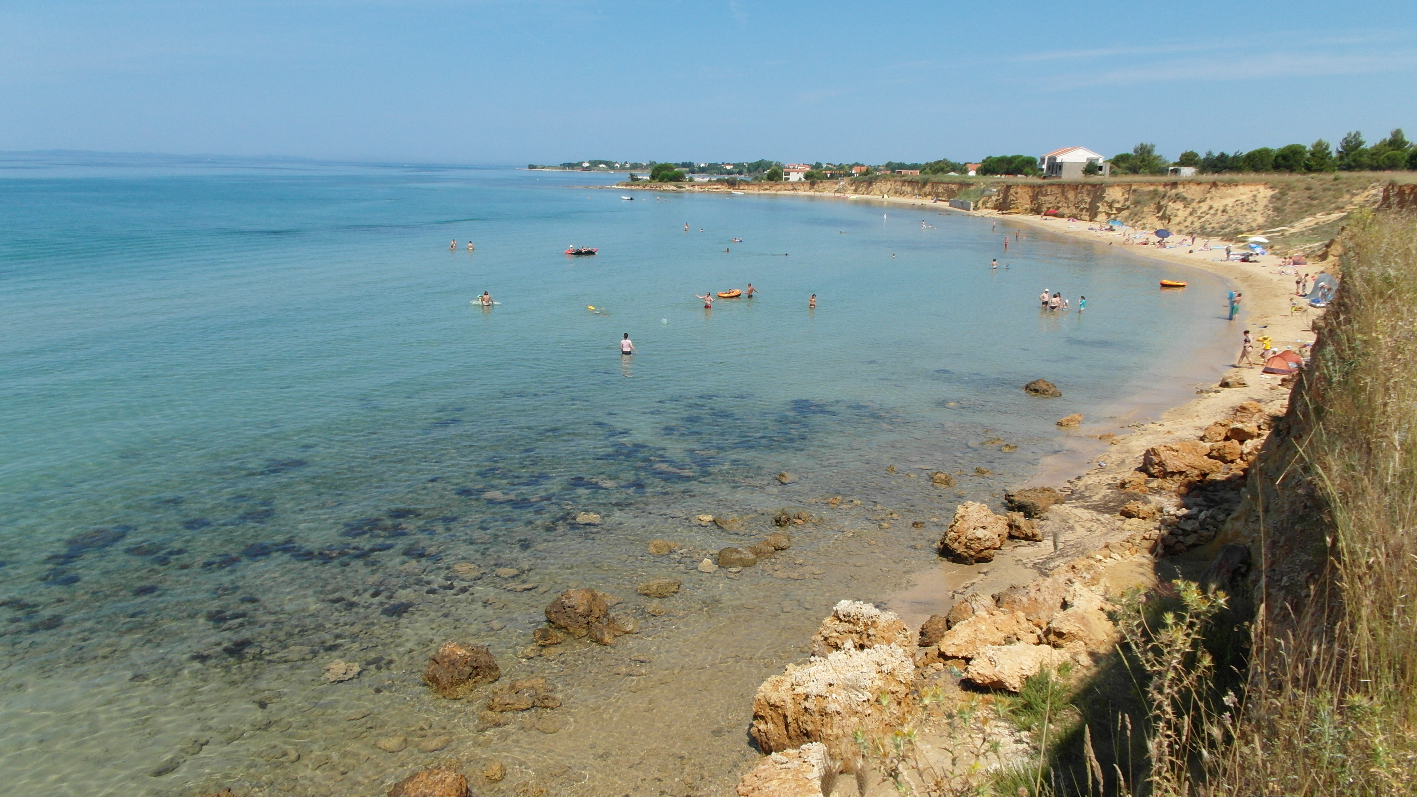 PLÁŽ Z VÝŠKY - BEACH FROM ABOVE